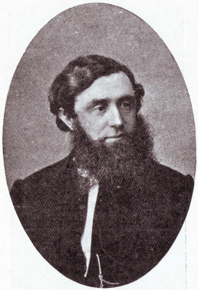 Ds. Frans Lion Cachet